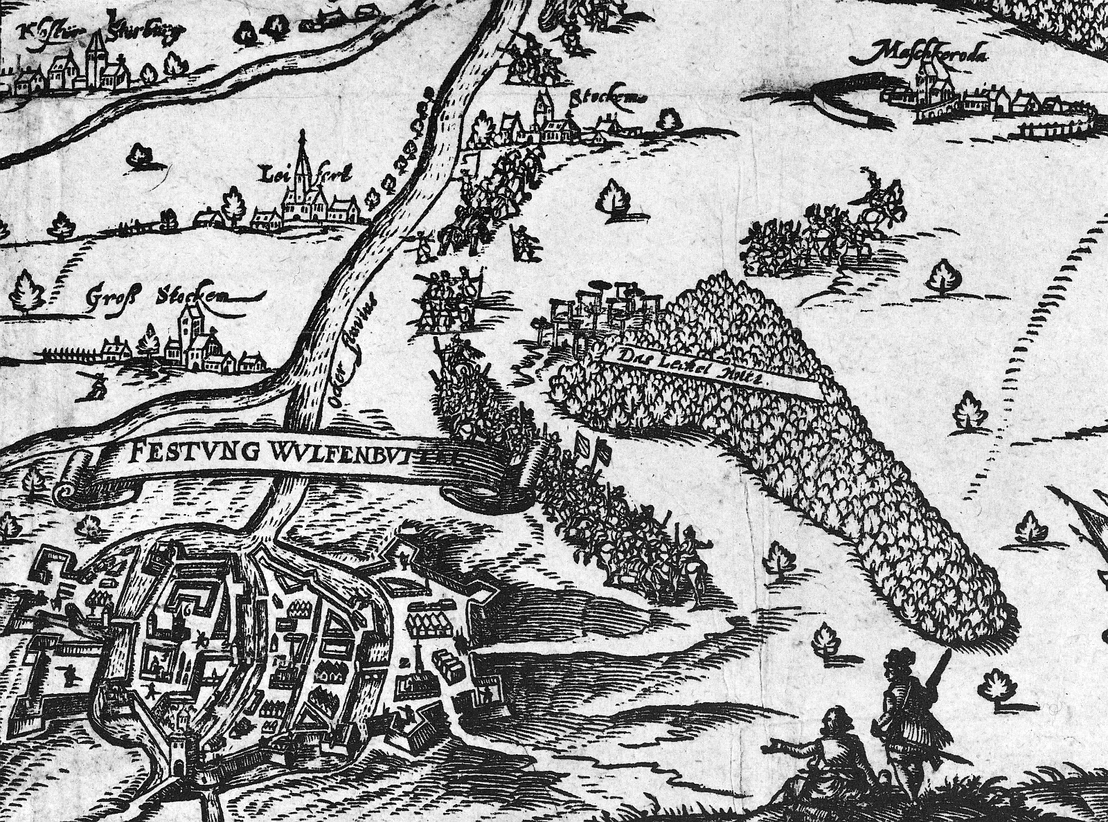 Braunschweig: Ausschnitt aus der Belagerungskarte von Braunschweig aus der Vogelschau, 1615, Detail zeigt die Festung Wolfenbüttel und nordöstlich davon „Das Lechel Holtz“ (heute: Lechlumer Holz). Deutlich erkennbar am nordwestlichen Ende des Waldes ist die Hinrichtungsstätte, das „Hohe Gericht“.